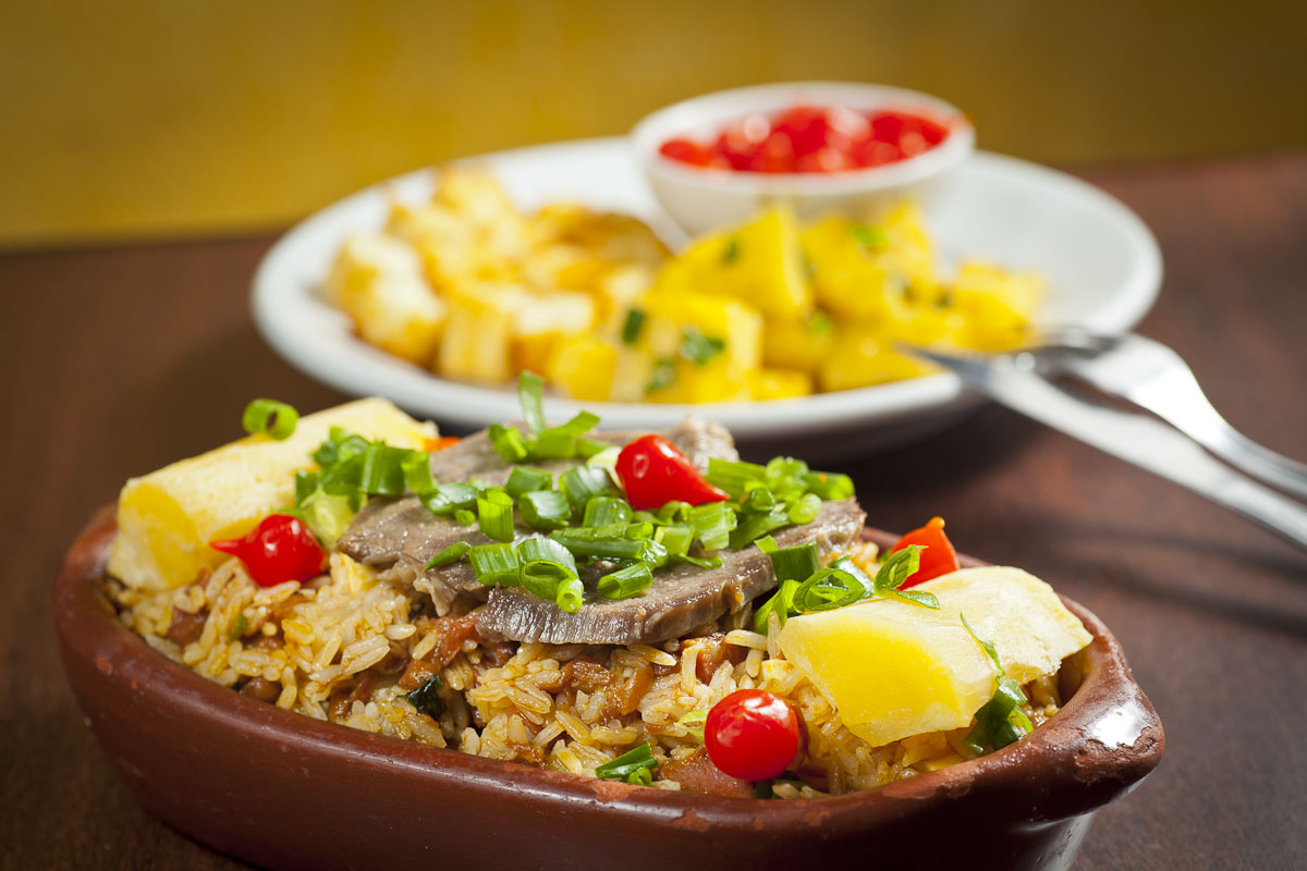 Baião de Dois com acompanhamento de mandioquinha.